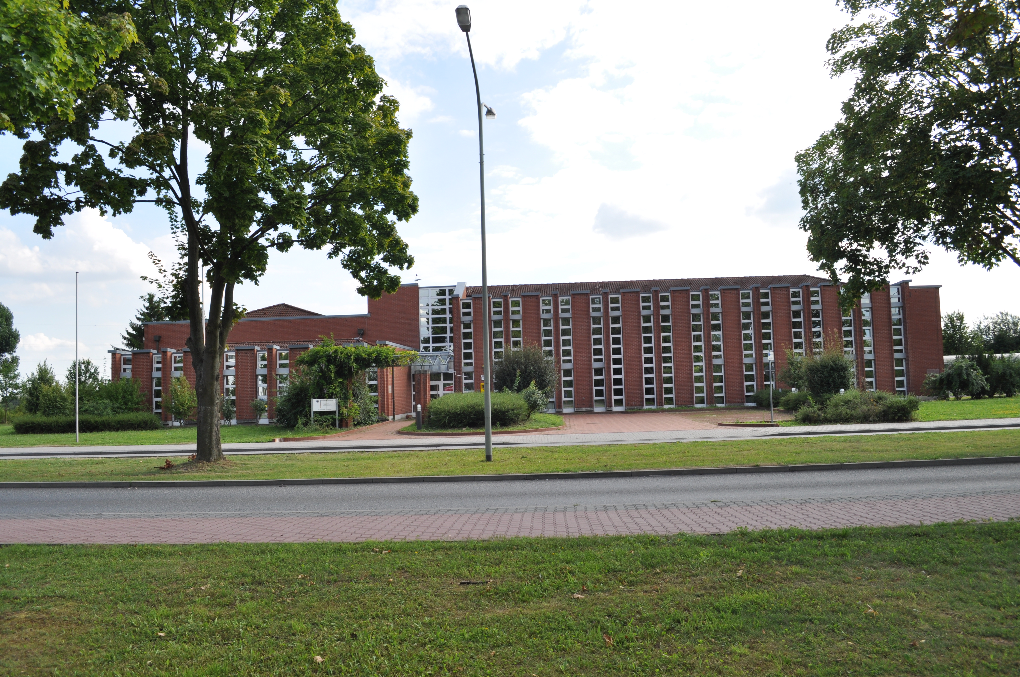 Gebäude der Bundesnetzagentur in Eschborn